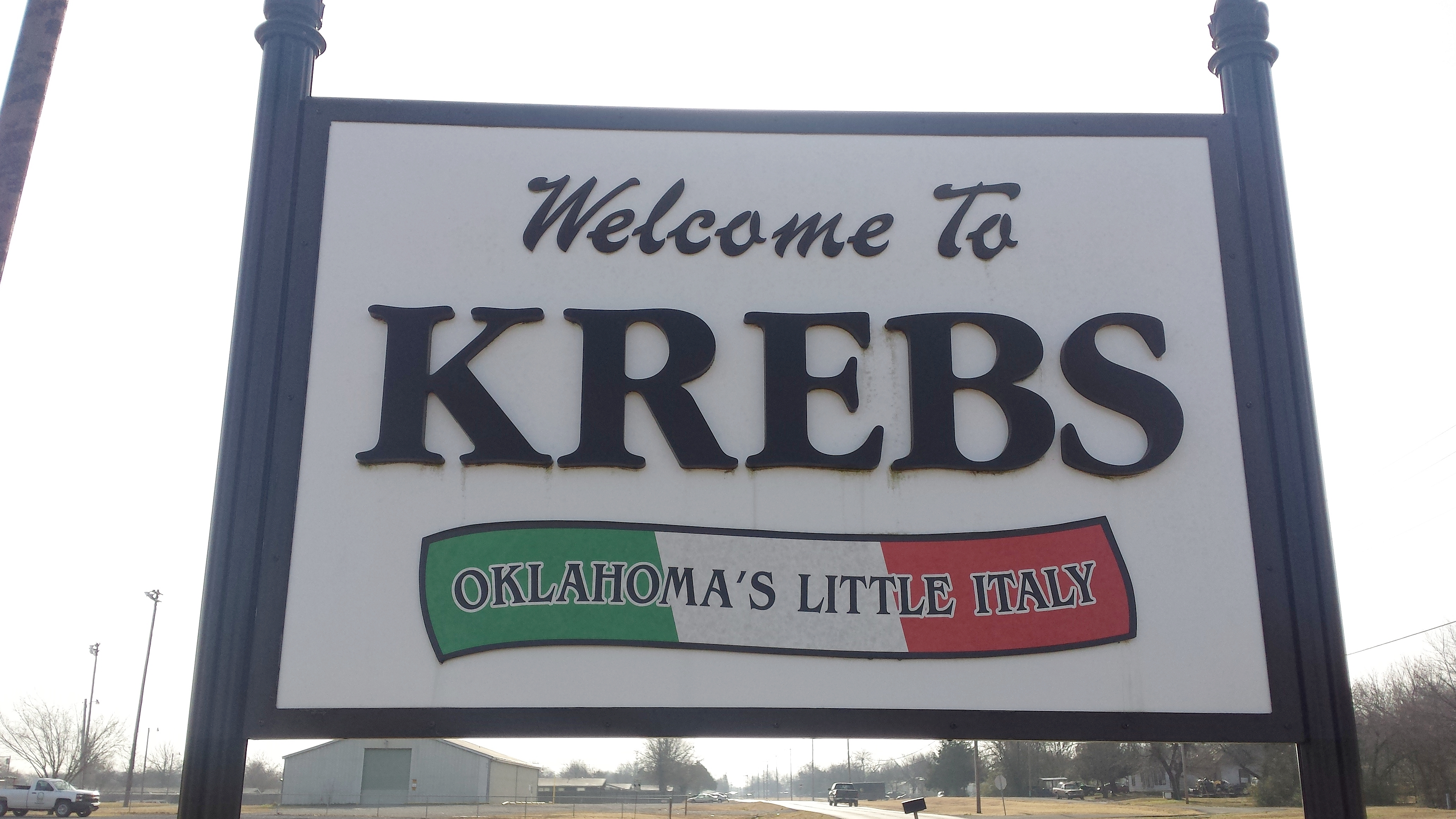 Welcome sign, Krebs, Oklahoma.